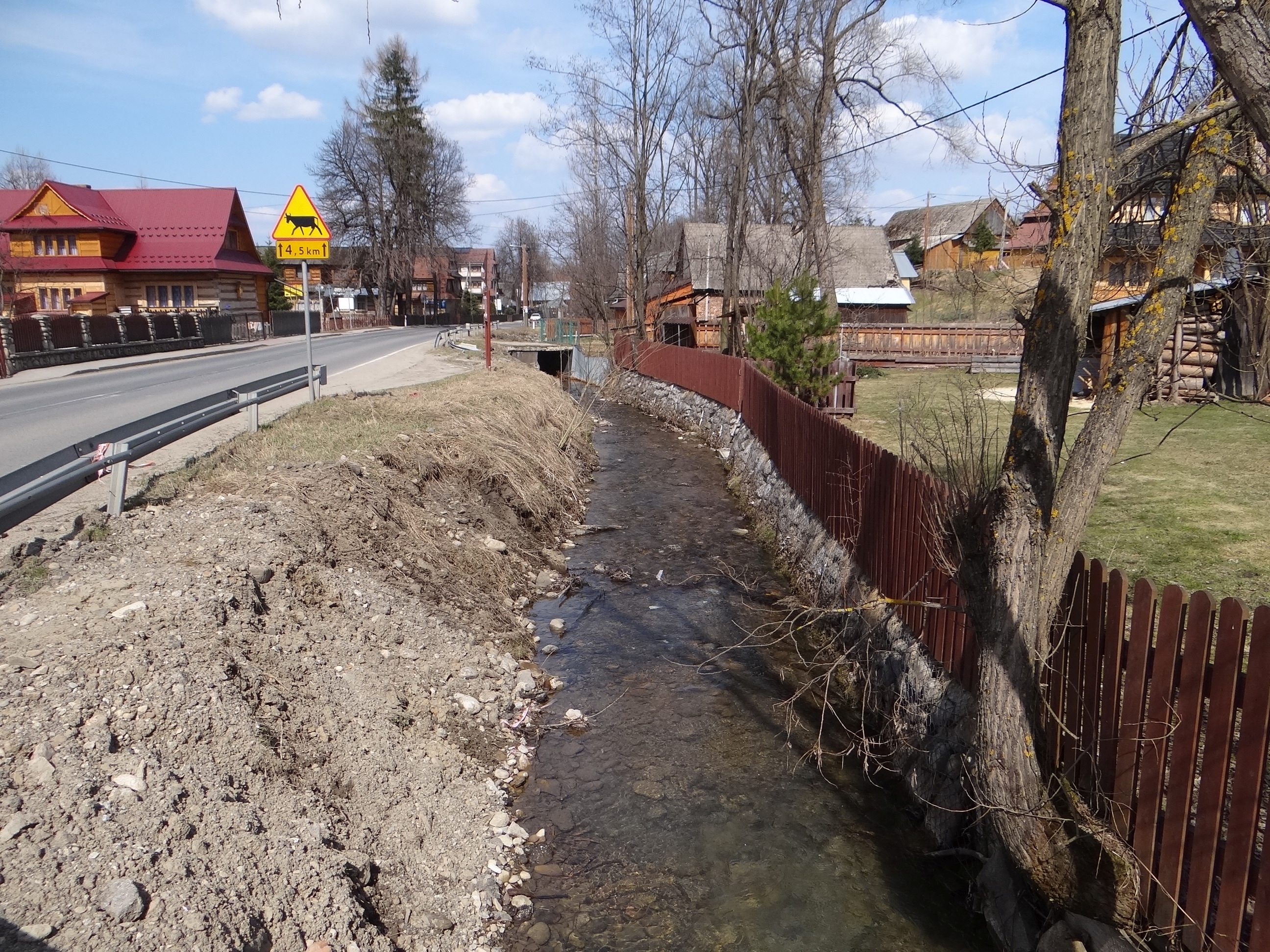 Młynówka w Chochołowie